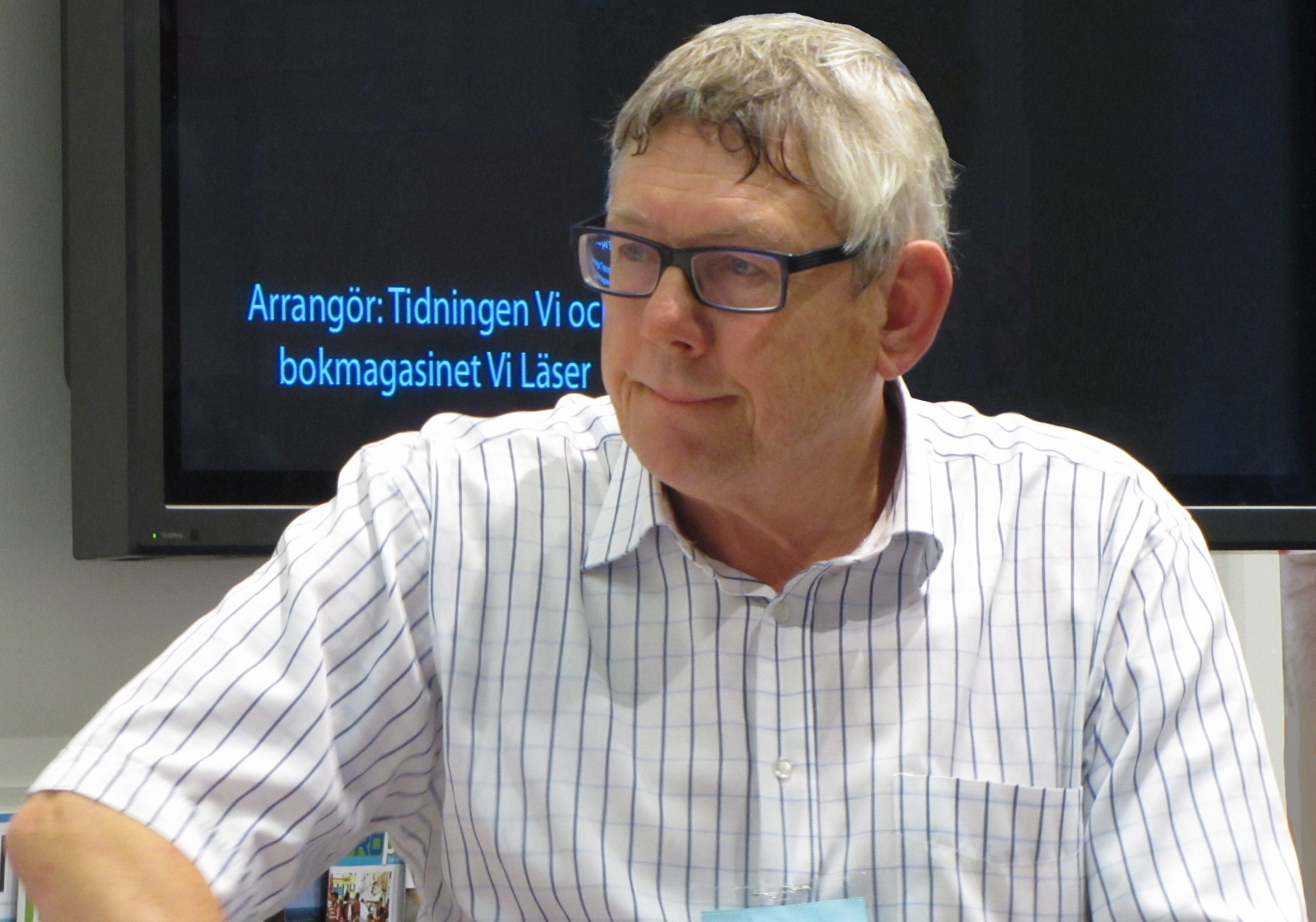 Journalisten Ingemar Unge.